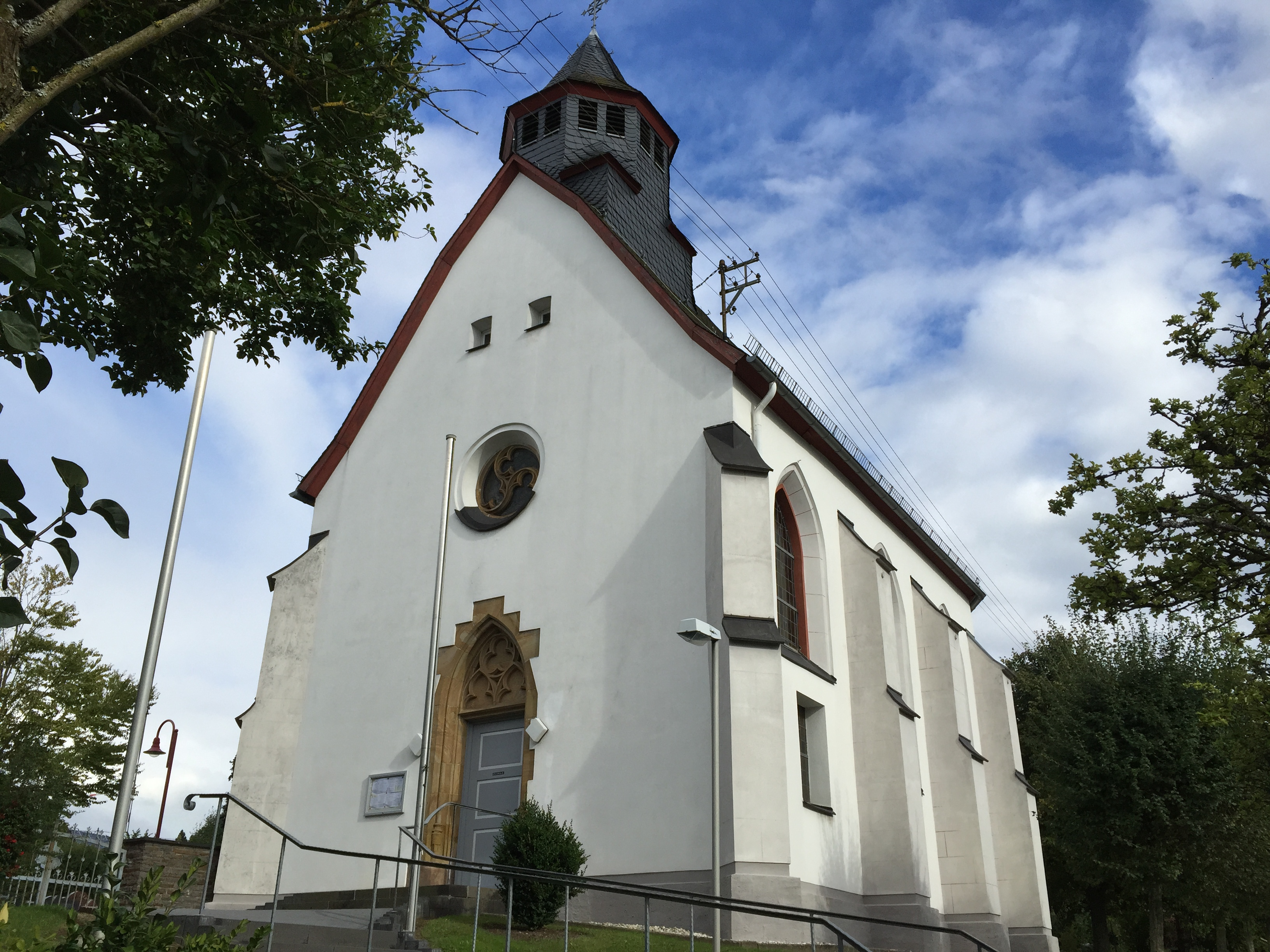 Kratzenburg (Hunsrück), Katholische Filialkirche St. Michael, neugotischer Saalbau, 1913; bauliche Gesamtanlage mit Friedhof